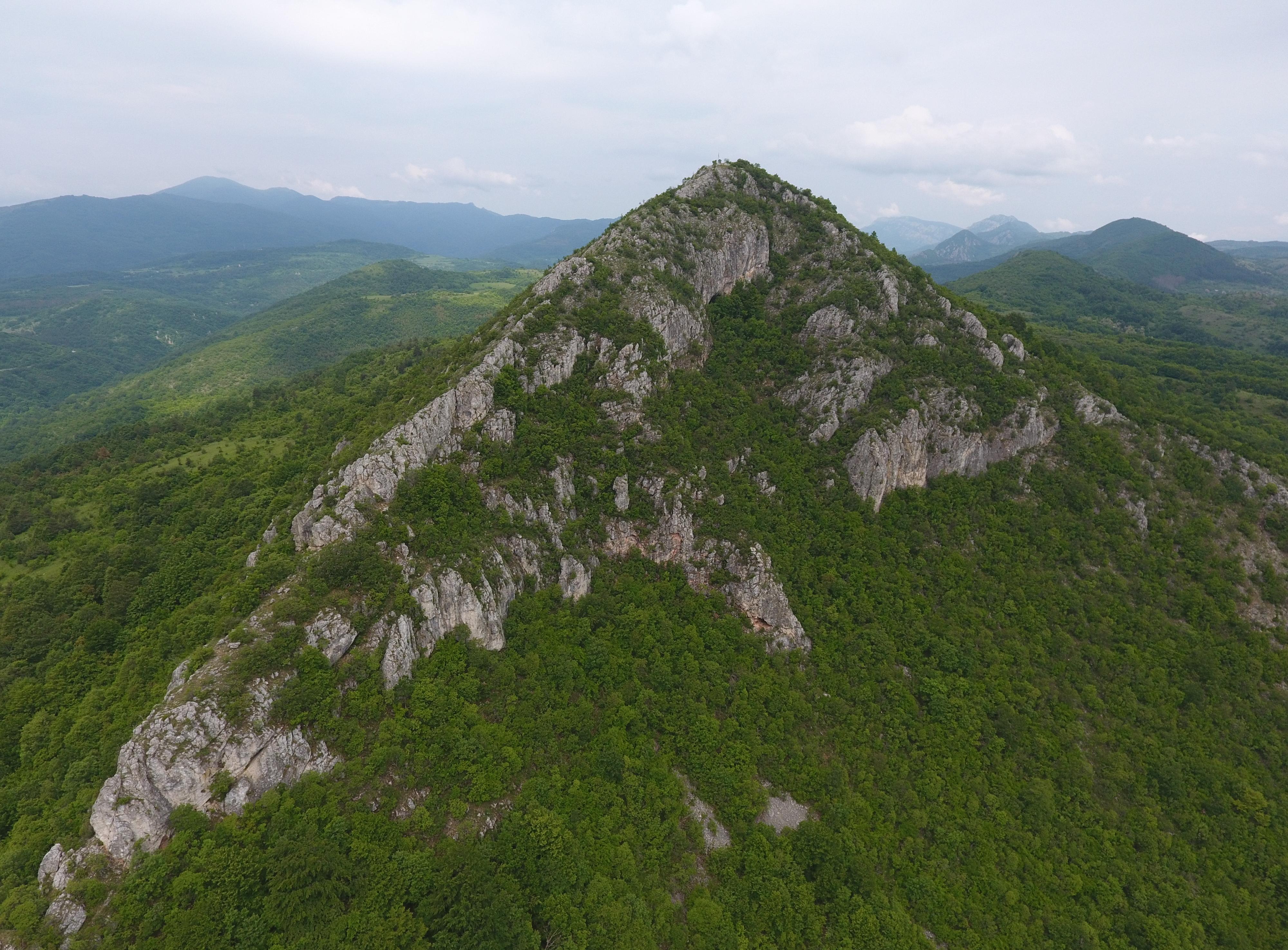 Връх Драговски камък 1118 м., с. Филиповци, Трънско.